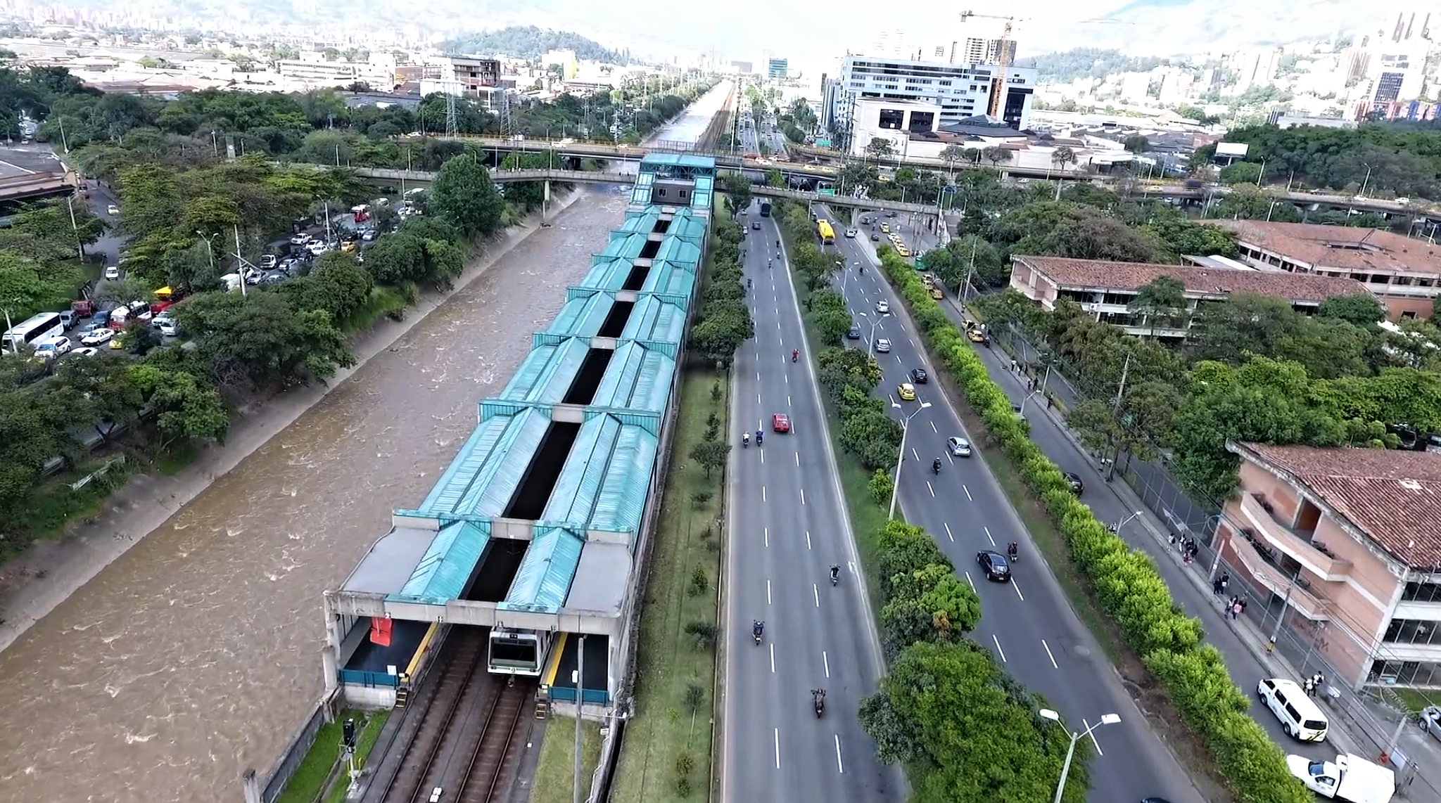 Estación Poblado (Metro de Medellín)